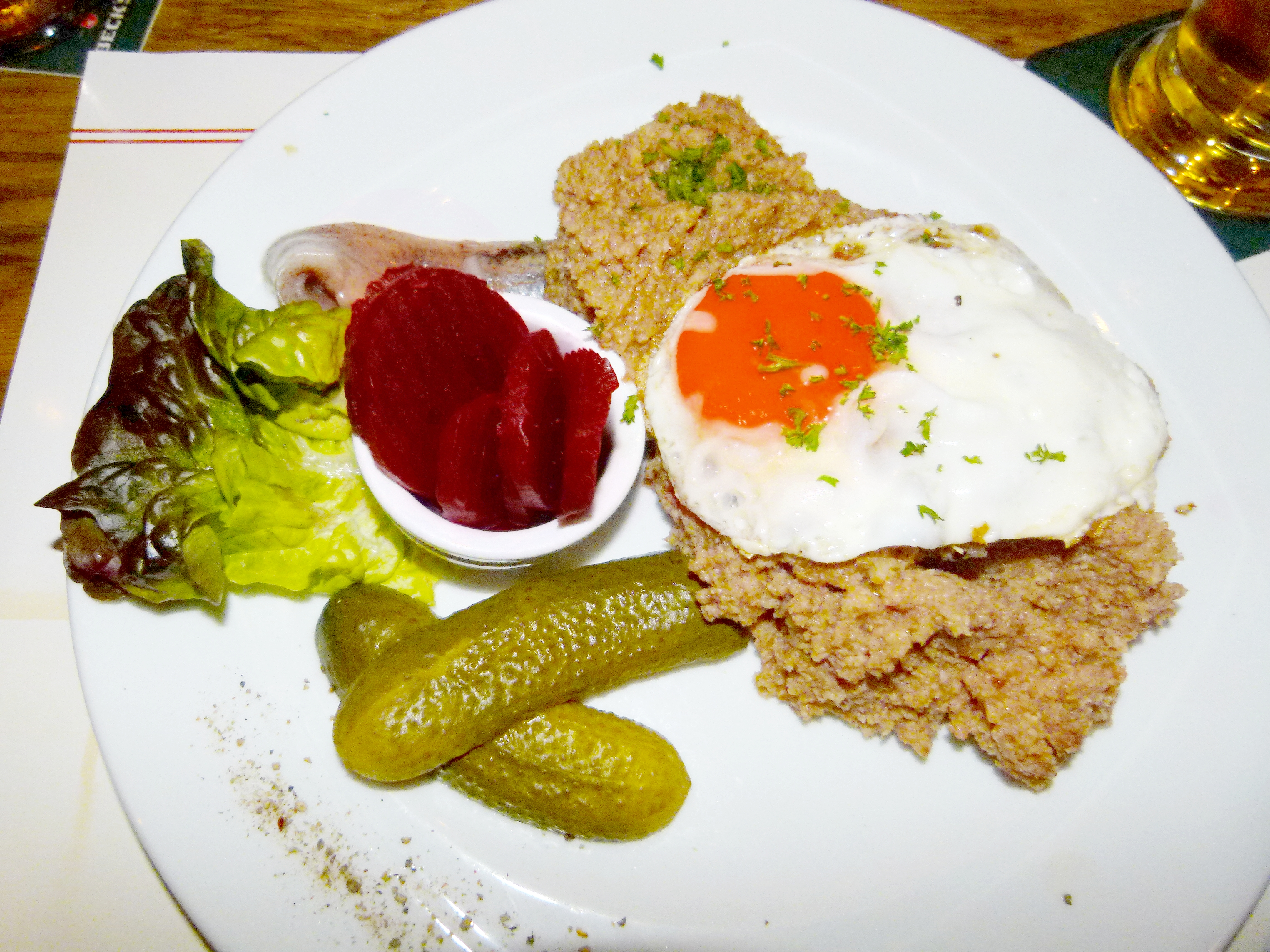 Labskaus in Bremen, Friesenhof in der Altstadt